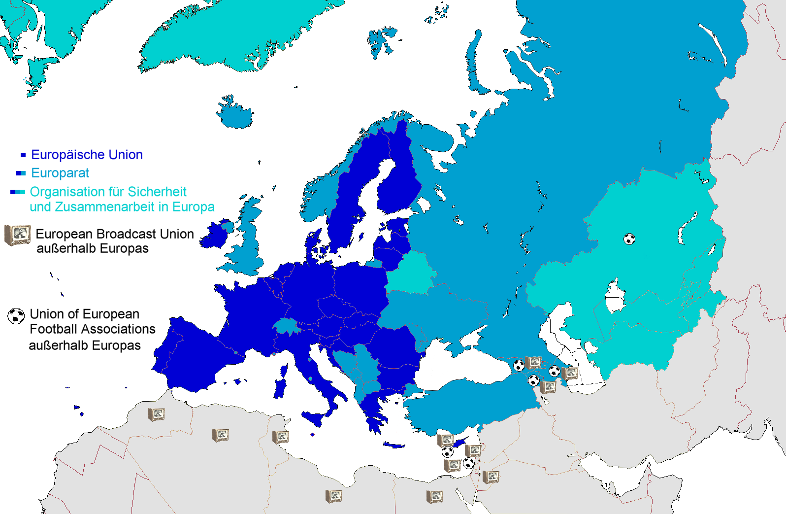 Europäische Organisationen: EU-27 (2020), Europarat, OSZE, EBU, UEFA